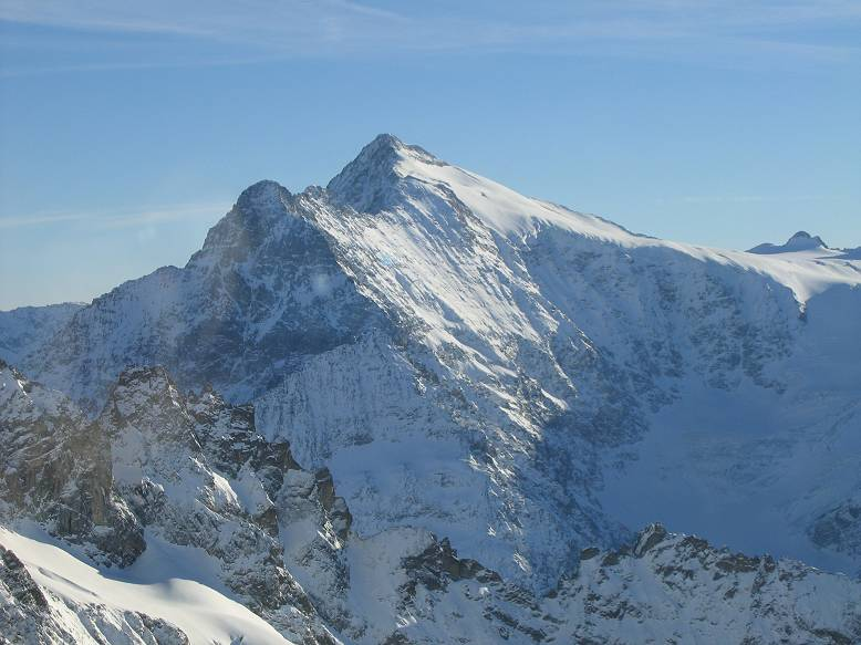 Blick vom Titlis Richtung Süden: Sustenhorn